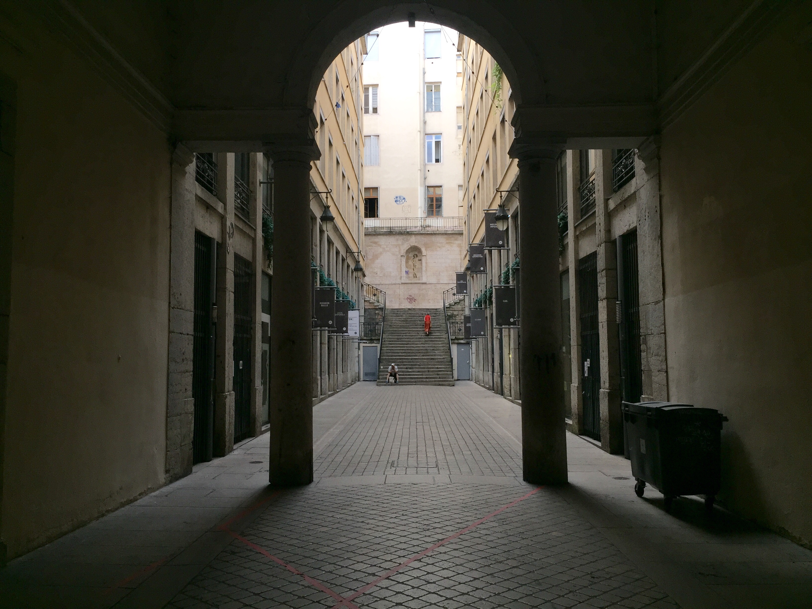 Passage Thiaffait.